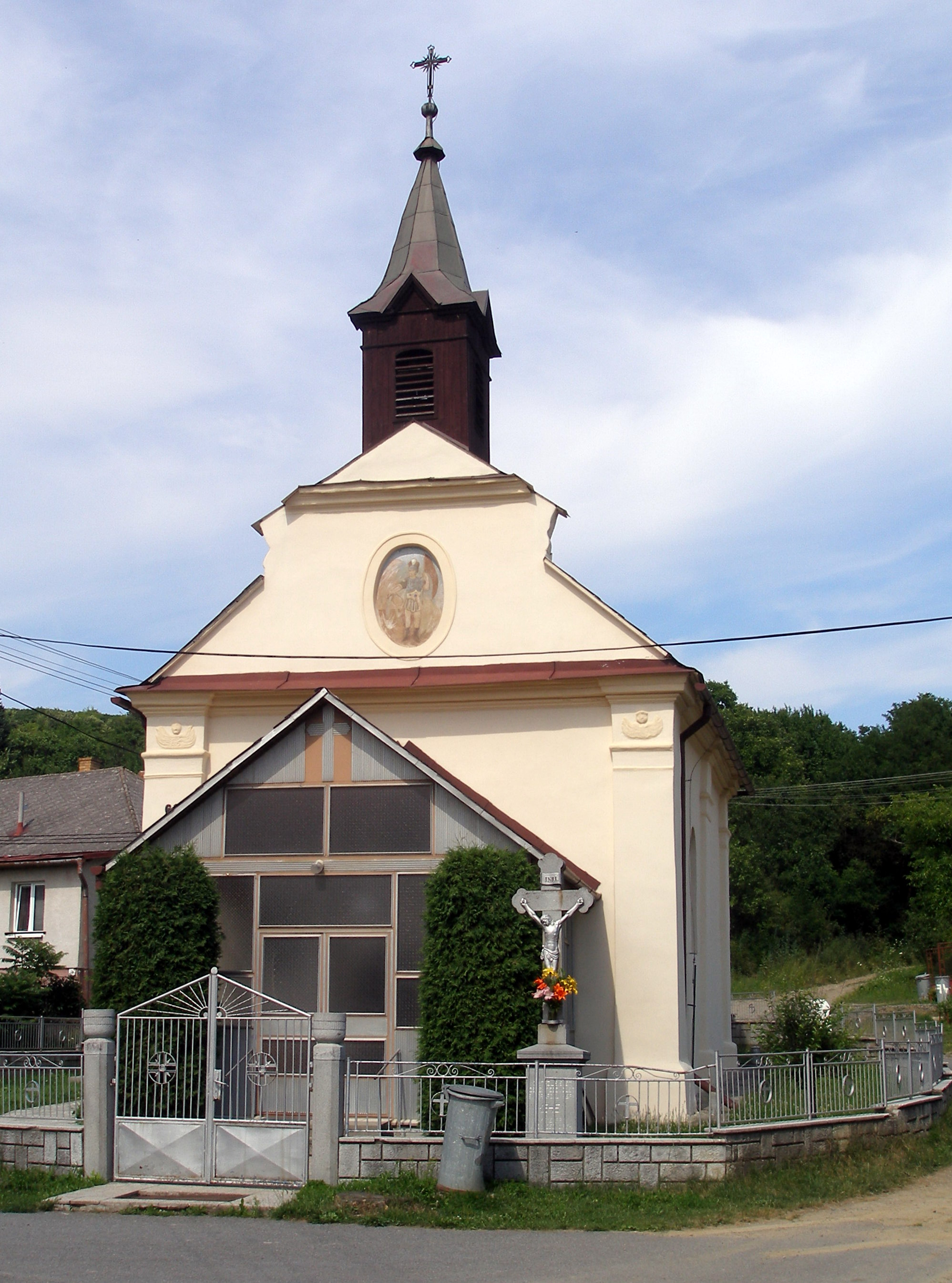 Kostol v obci Hubošovce okres Sabinov, región Šariš